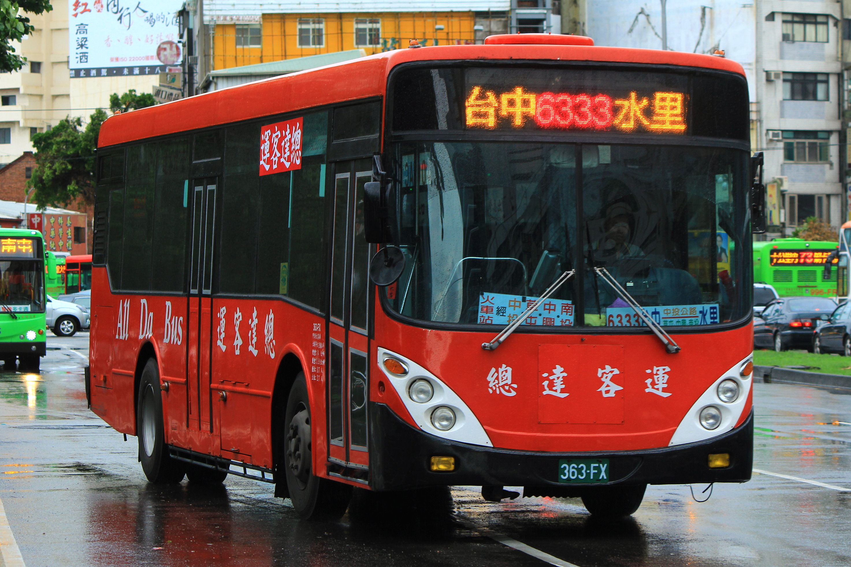 6333準備出發